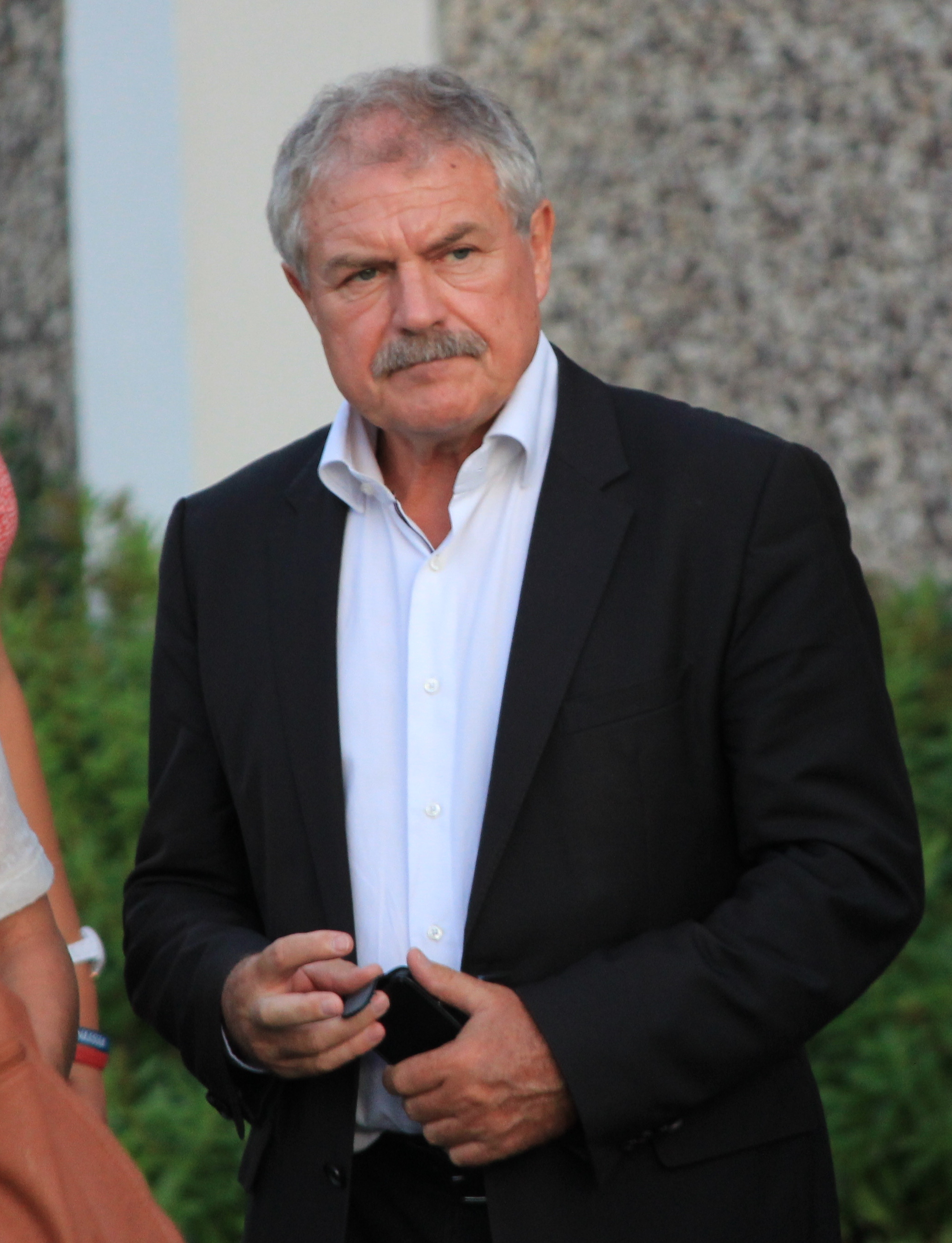 Norbert Métairie, maire de Lorient, lors du festival interceltique de Lorient.